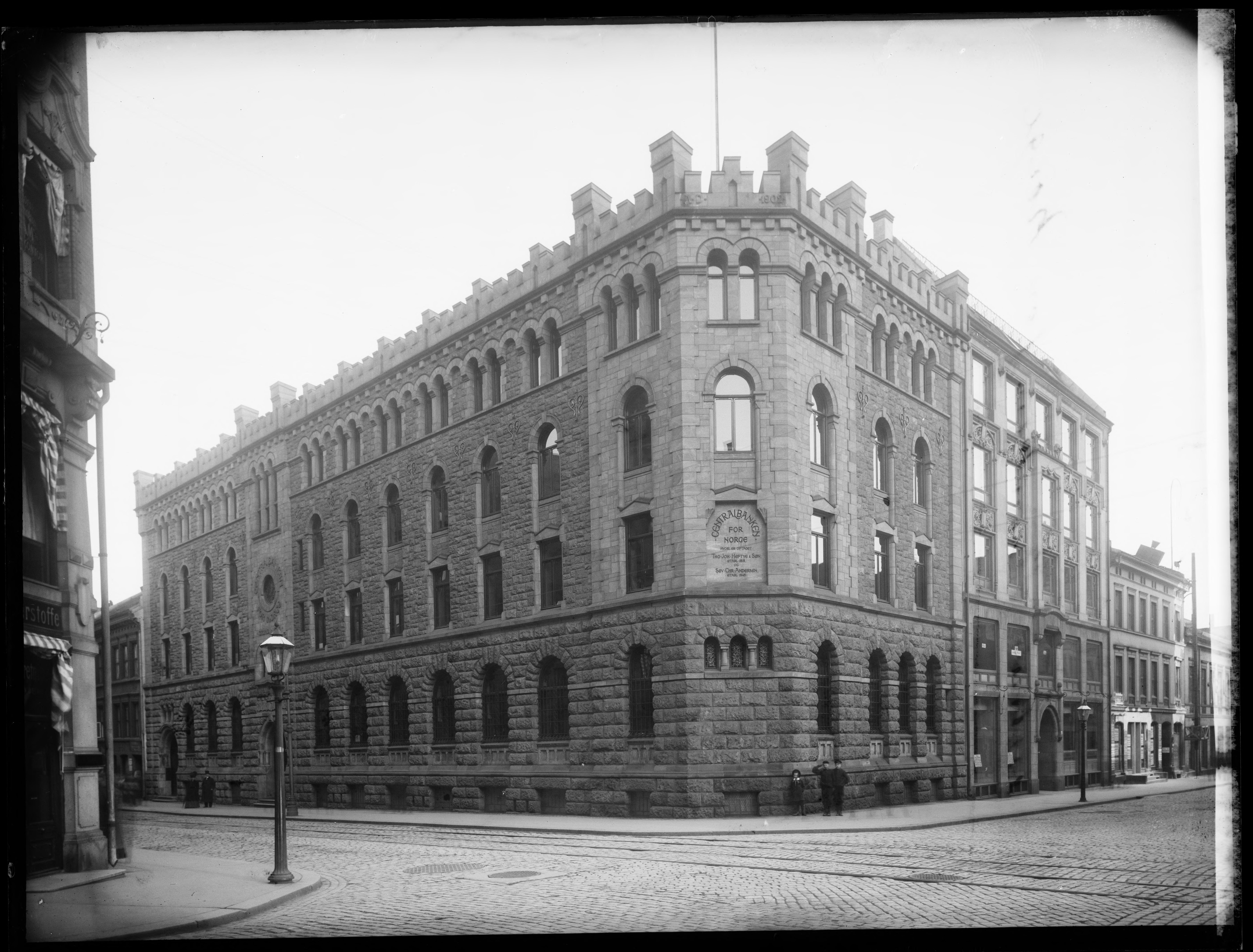 Bildet er hentet fra Nasjonalbibliotekets bildesamling. Anmerkninger til bildet var: Påskrift arkivark: Central Banken for Norge Eldste arkivnummer: 728 Yngre arkivnummer: 108, 45 Oslo, Oslo, Oslo